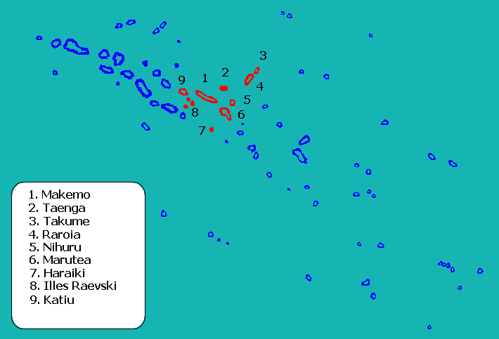 Mapa de localització de la comuna de Makemo a l'arxipèlag Tuamotu, Polinèsia Francesa.